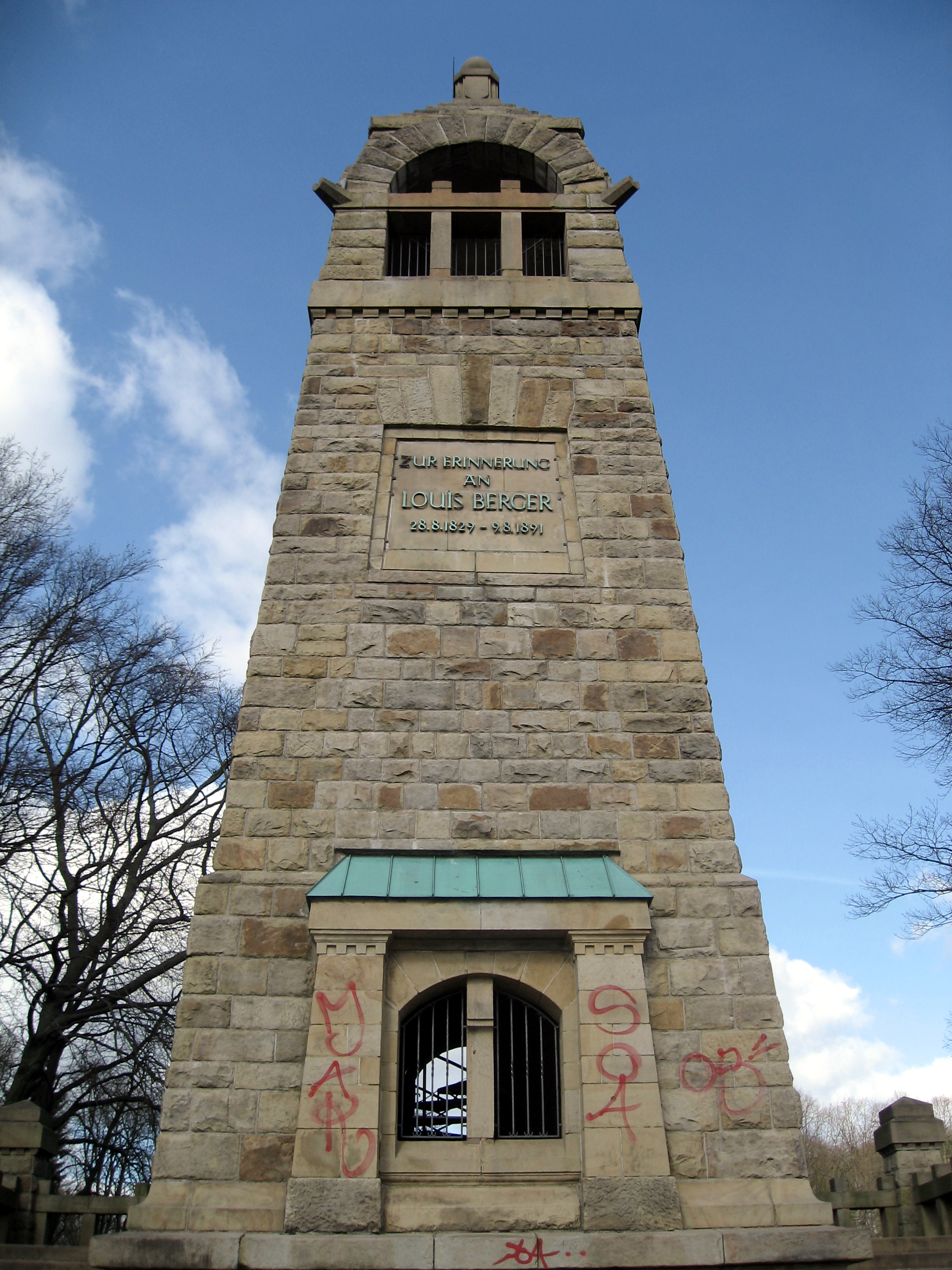 Witten, Hohenstein, Berger-Denkmal für Louis Constans Berger This is a photograph of an architectural monument.